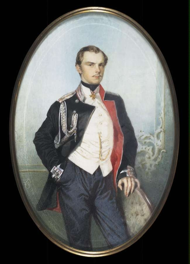 Владимир Васильевич Левашов